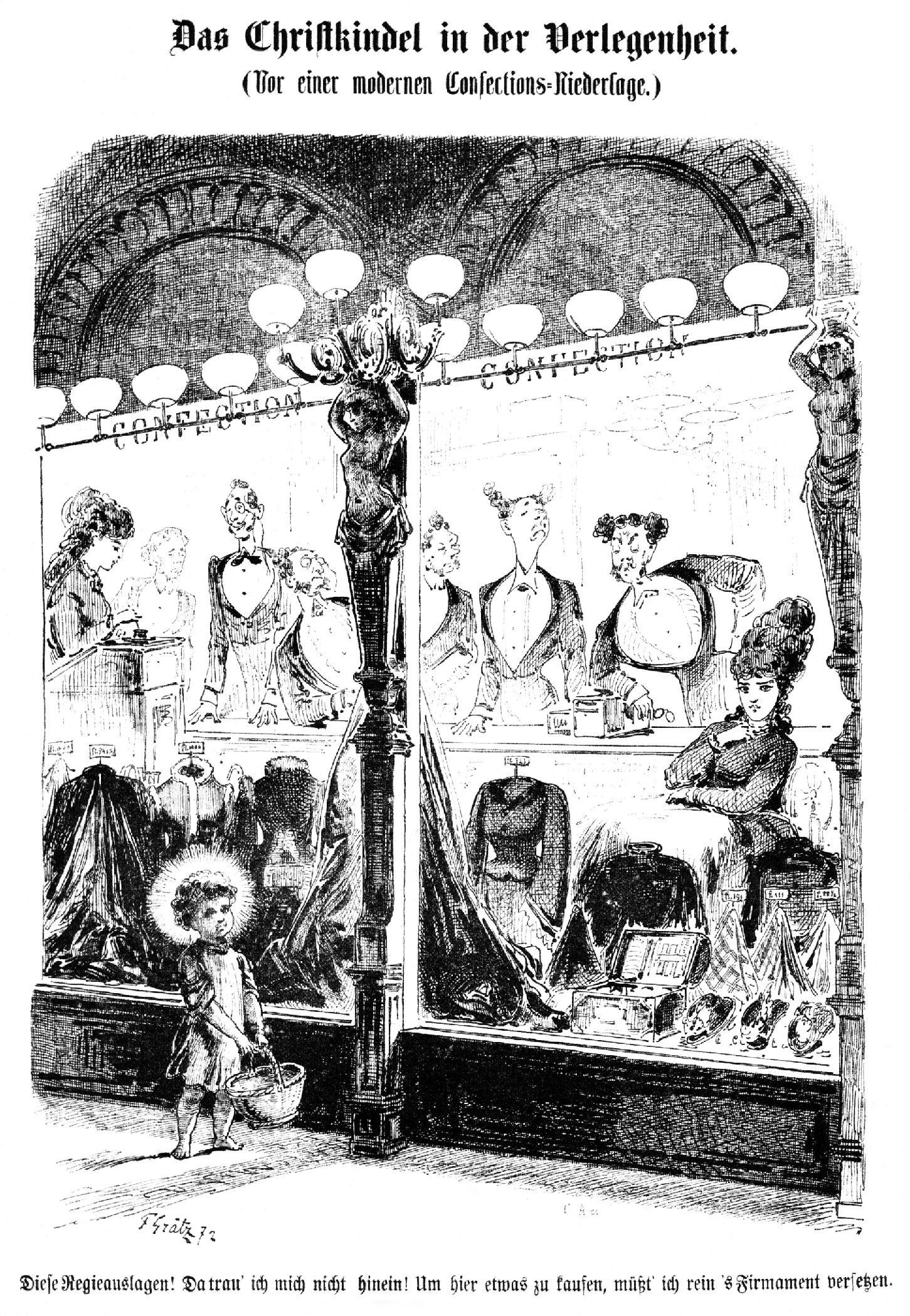 Das Christkind vor einem ausländischen Modehaus in Wien. Karikatur von Friedrich Grätz. Transkription: Das Christkindel in der Verlegenheit. (Vor einer modernen Confections-Niederlage.) Diese Regieauslagen! Da trau’ ich mich nicht hinein! Um hier etwas zu kaufen, müßt’ ich rein ’s Firmament versetzen.